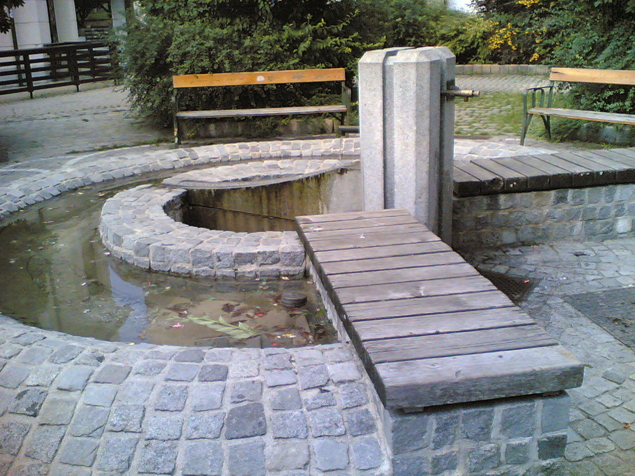 1.9.2005 Breitensee